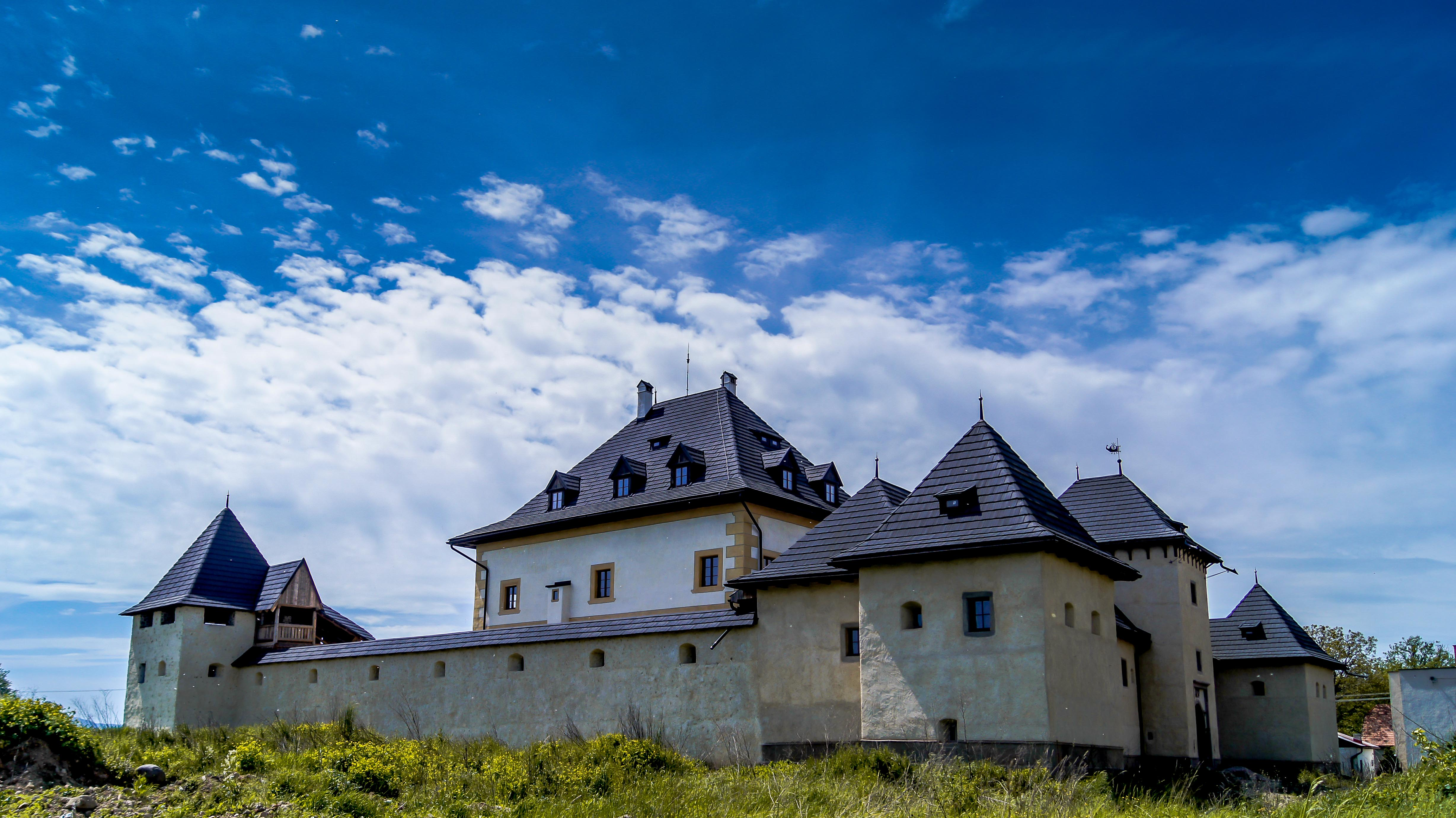 Vodný hrad, Hronsek, okres Banská Bystrica